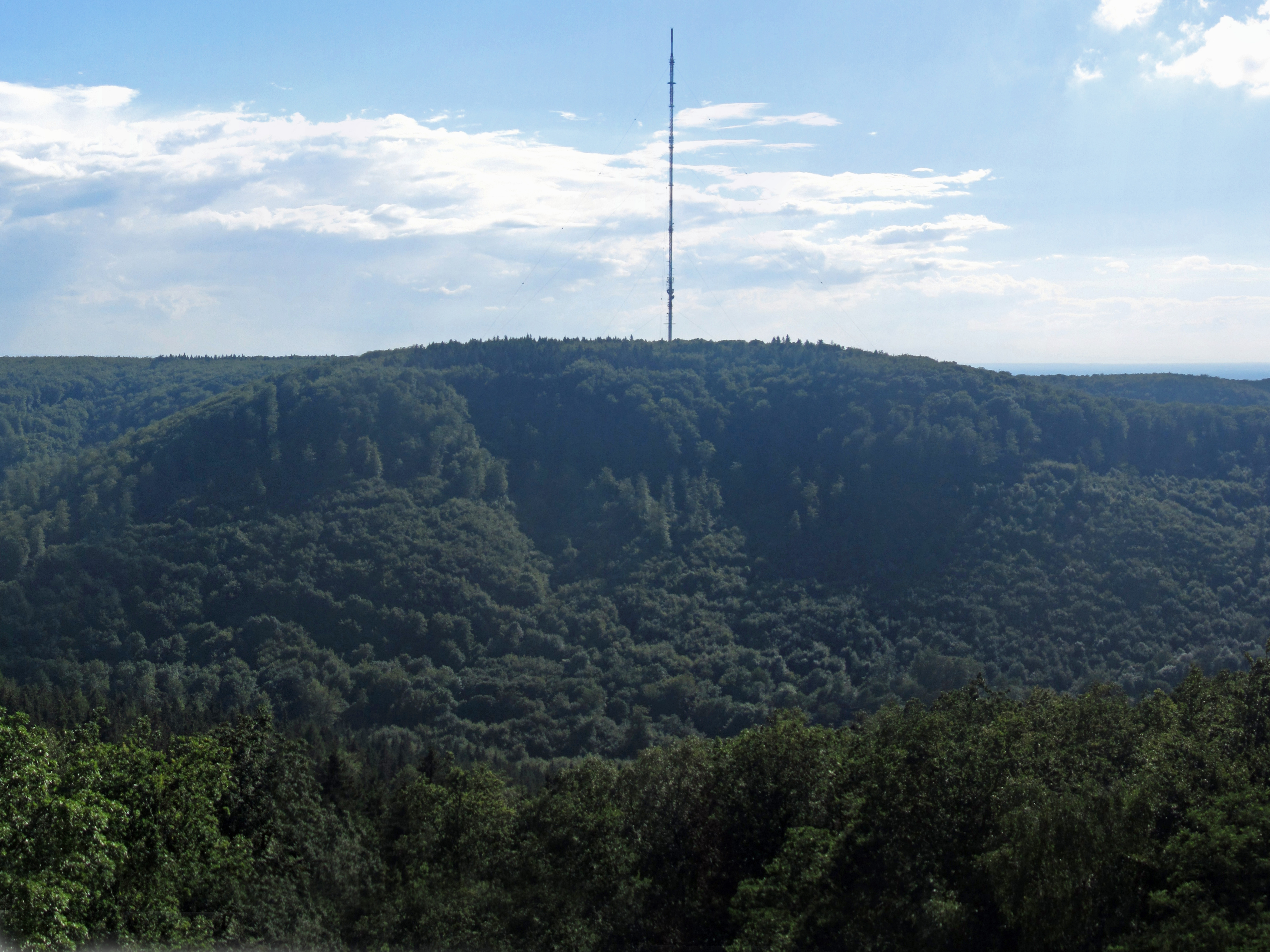 Blick vom Hermannsdenkmal zum Bielstein (394 m) mit dem WDR-Sendemast.